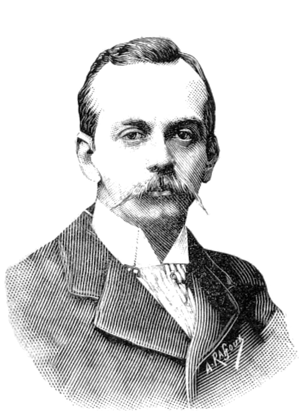 "Notre camarade Marc Sangnier-Lachaud".